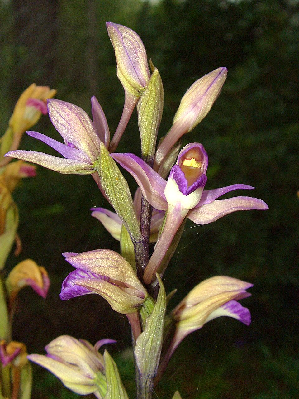 Limodorum abortivum - flowers